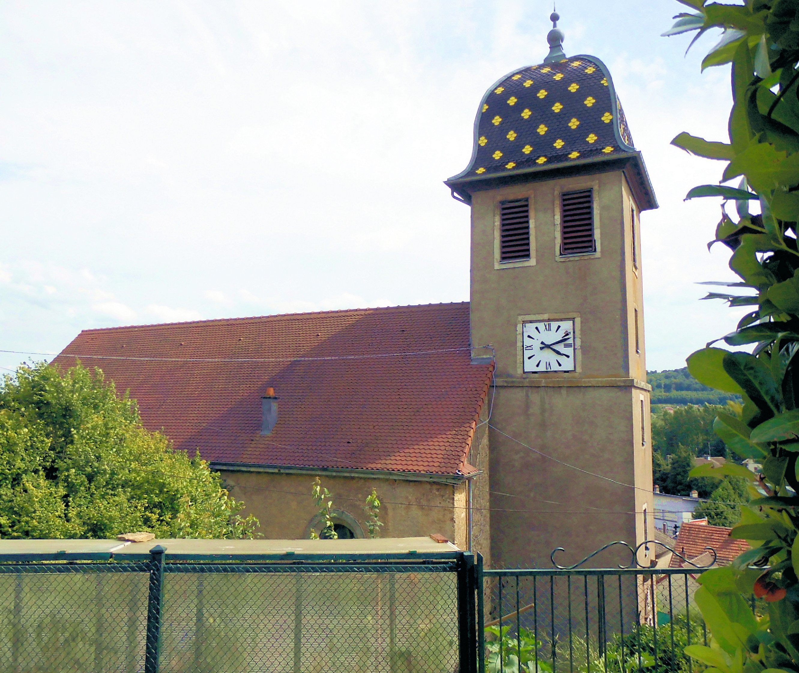 La tour d'église luthérienne de Bavans